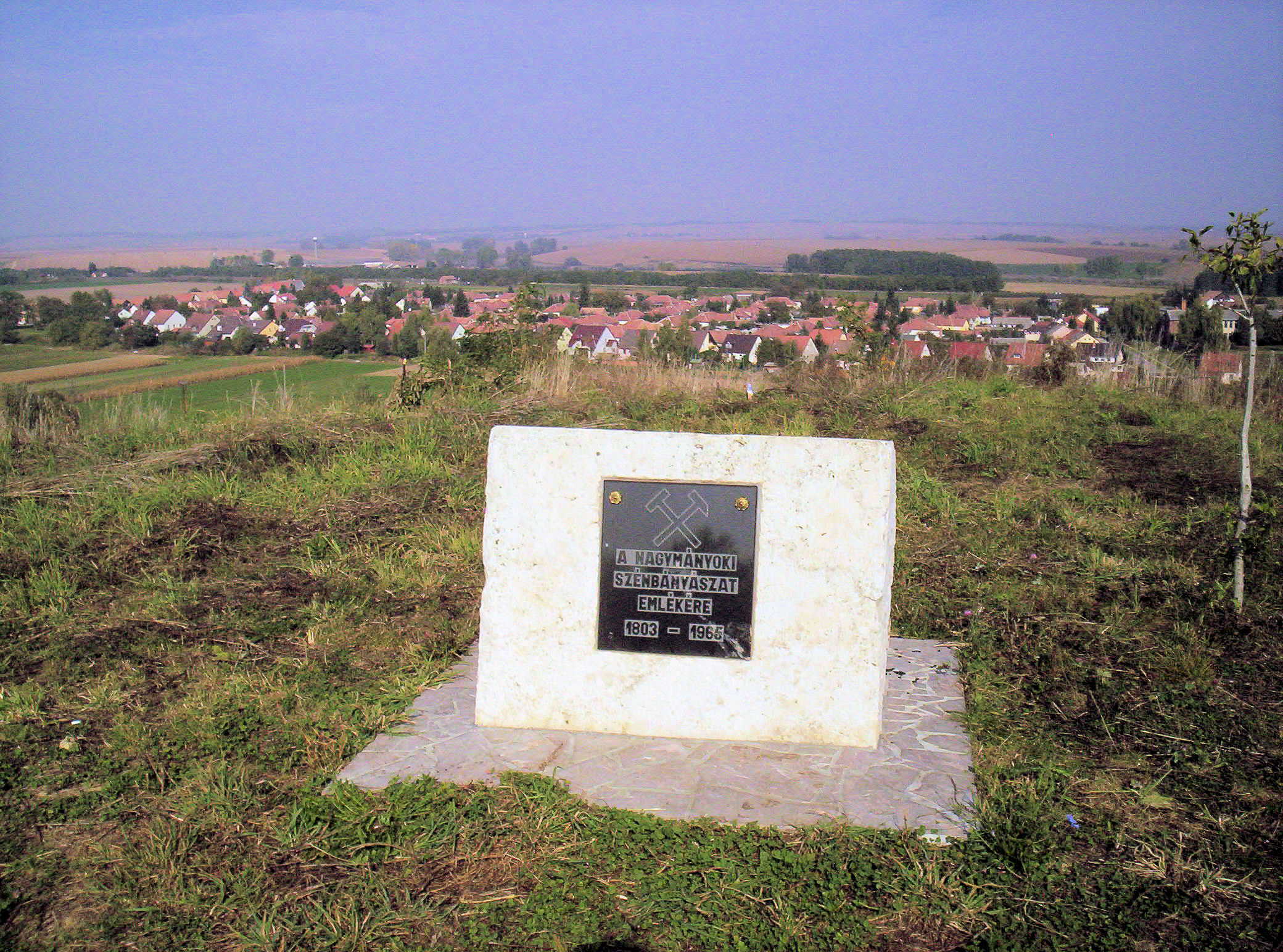 A nagymányoki szénbányászat emlékműve a település melletti – rekultivált – meddőhányón – photo taken by uploader User:Csanády in 2006.